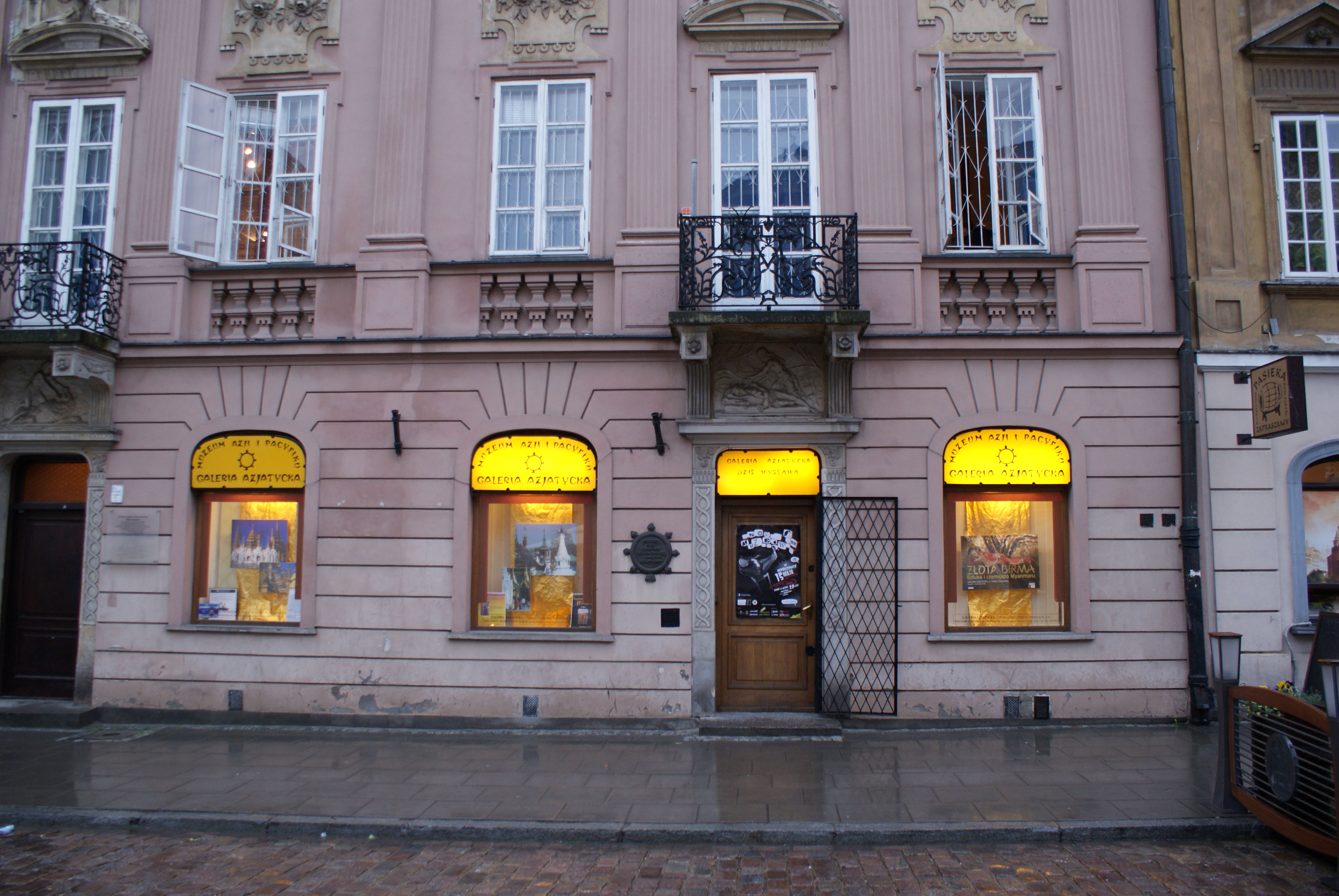 Galeria Azjatycka Muzeum Azji i Pacyfiku w kamienicy Pod Samsonem w Warszawie, ul. Freta 5.